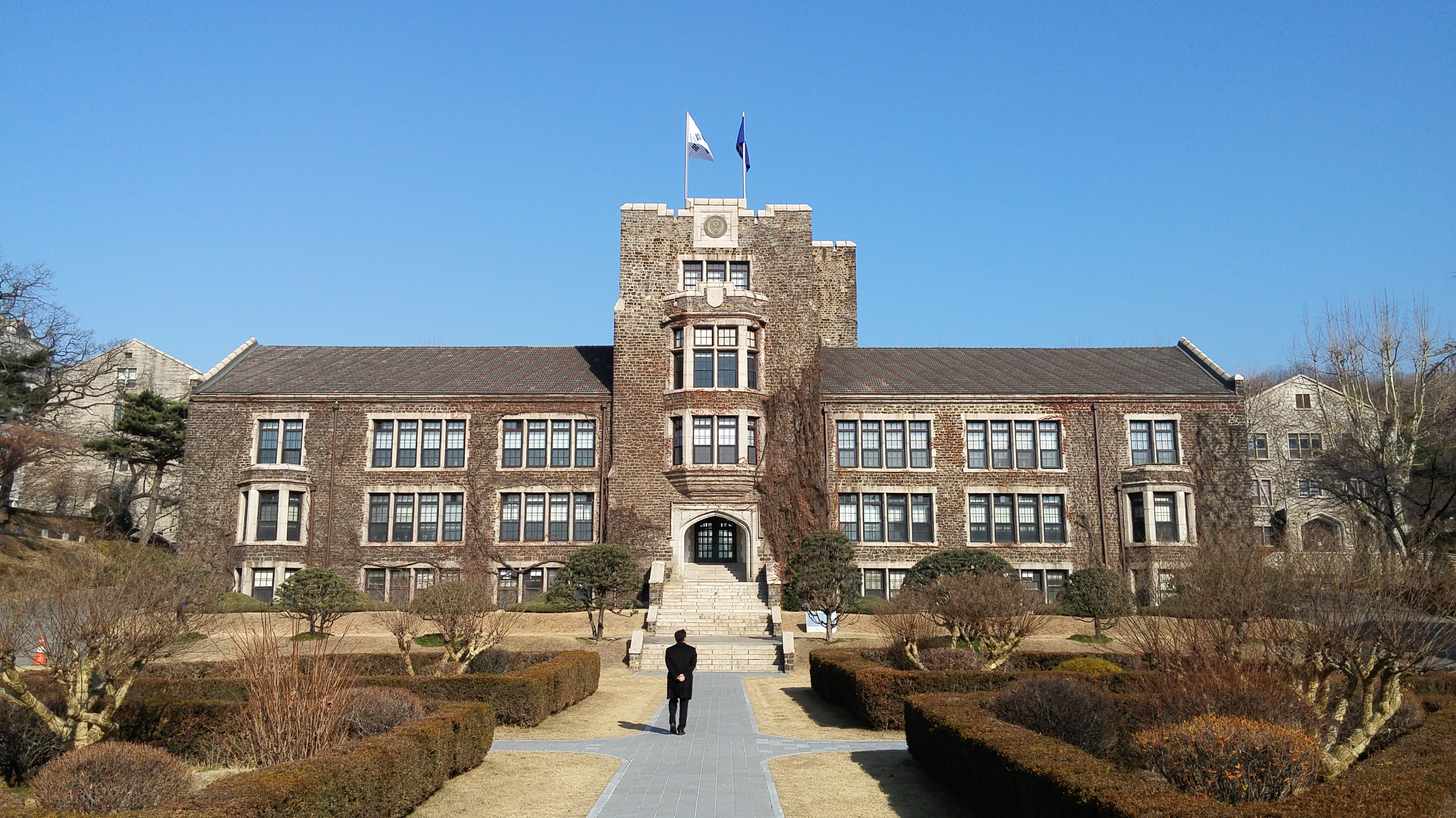 Der Campus der Yonsei University in Sinchon.